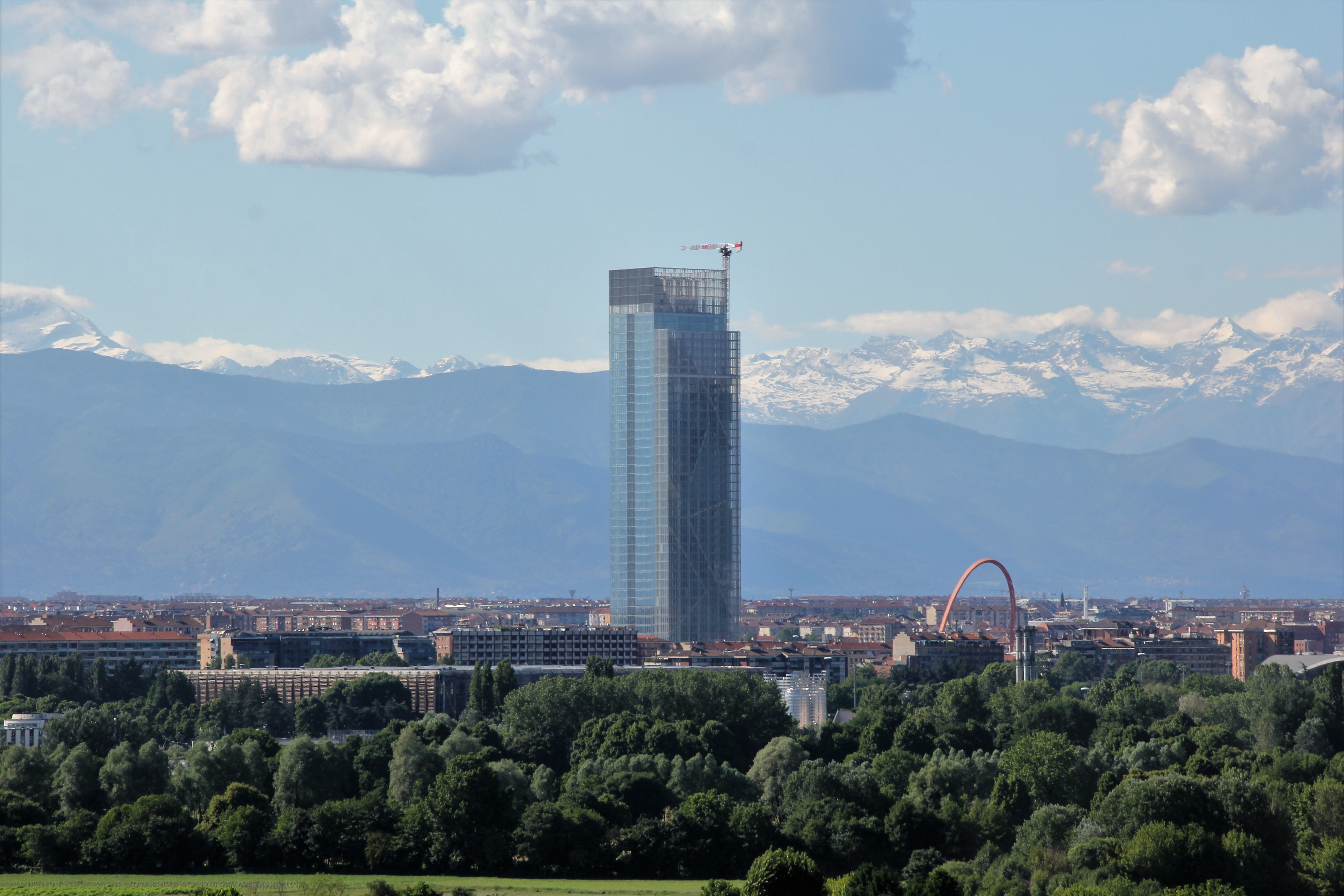 Torino, grattacielo della Regione Piemonte